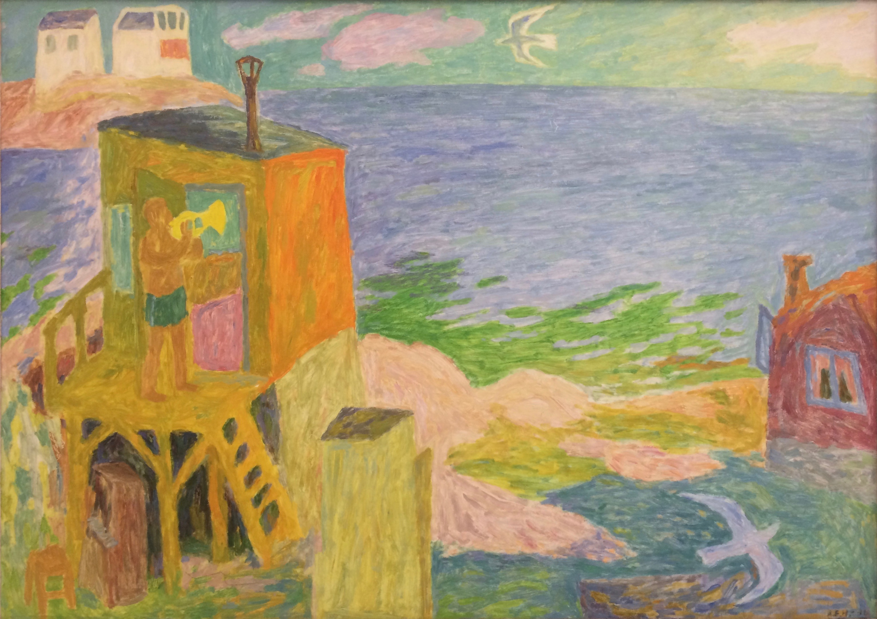 Maleri «Komponistens hytte » innkjøpt til Trondhjems Kunstforening i 1946